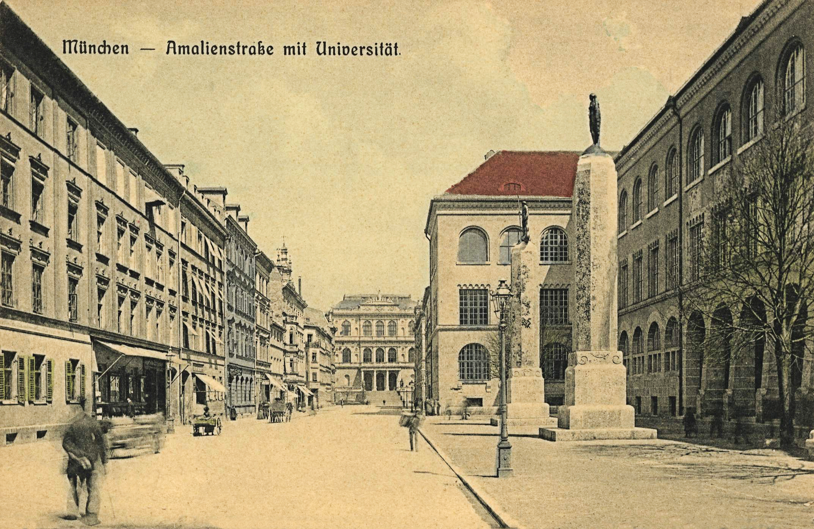 Deutschland, Bayern, München, Postkarte: Amalienstraße hinter der Universität um 1900